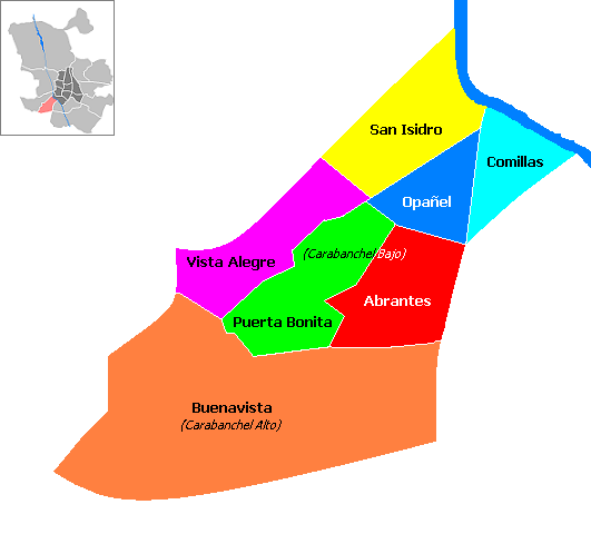 División del distrito madrileño de Carabanchel en barrios (Madrid, España)